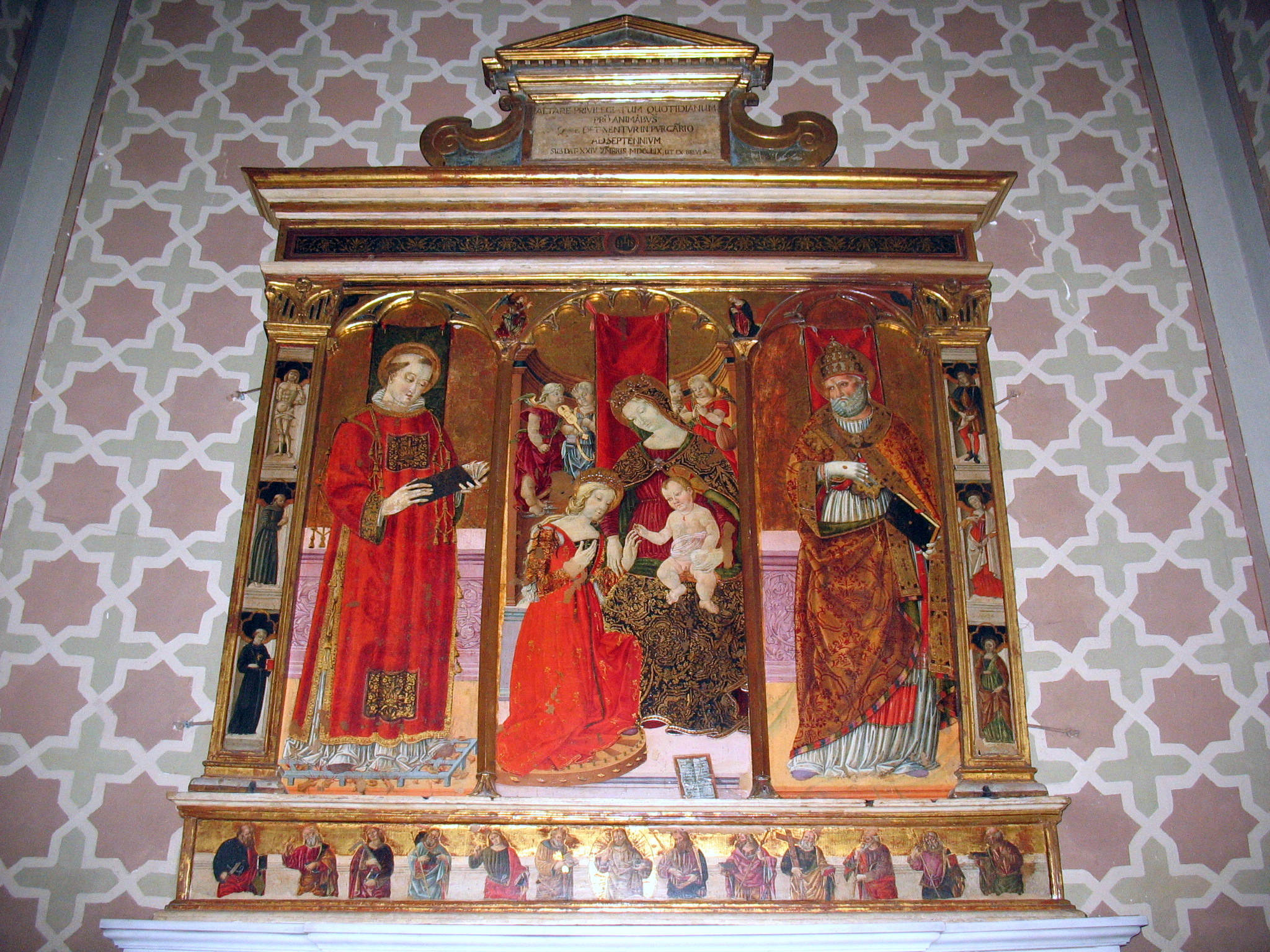 Trittico di Stefano Folchetti di San Ginesio (1507), Collegiata di San Lorenzo, Urbisaglia.